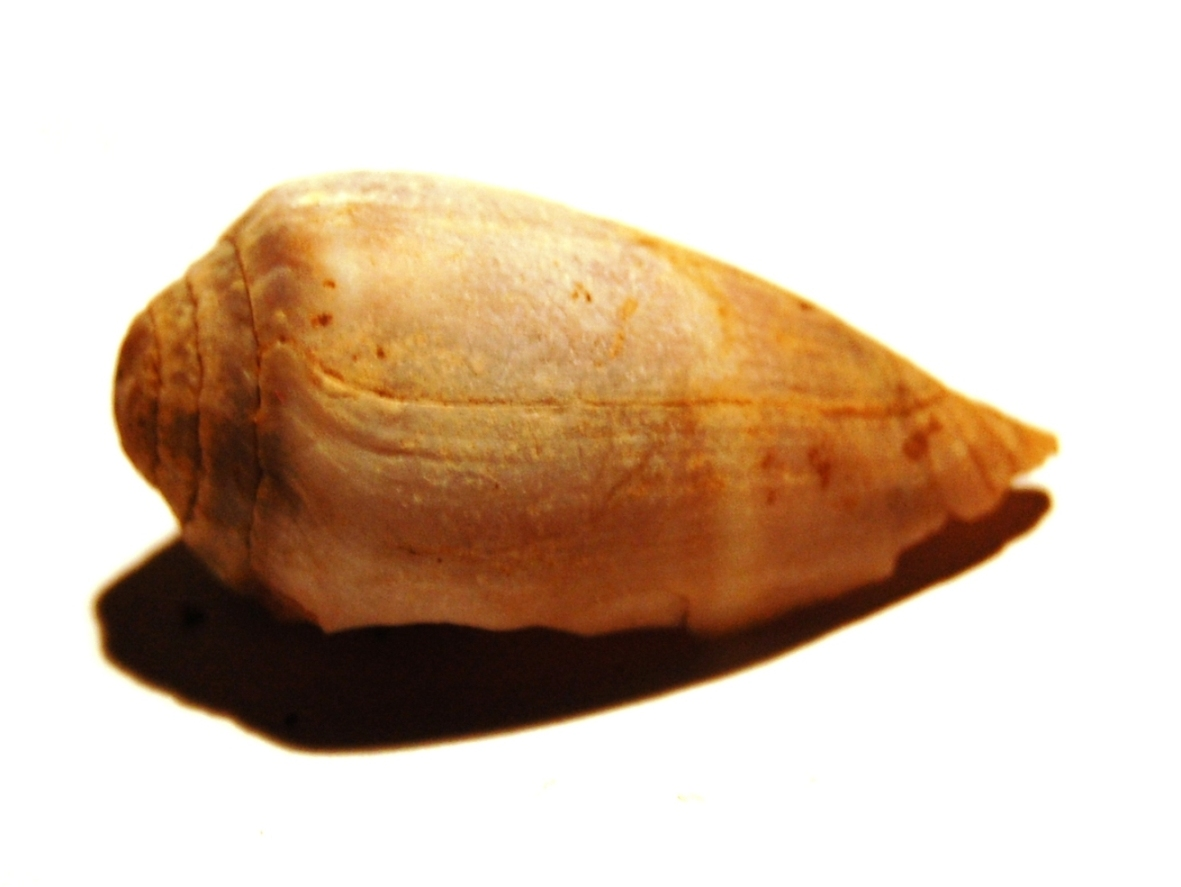 Conus mediterraneus (Conidae)